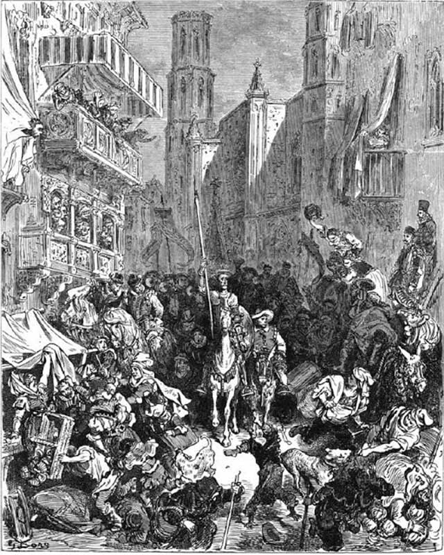 Don Quijote en Barcelona, grabado de Gustave Doré (1863).